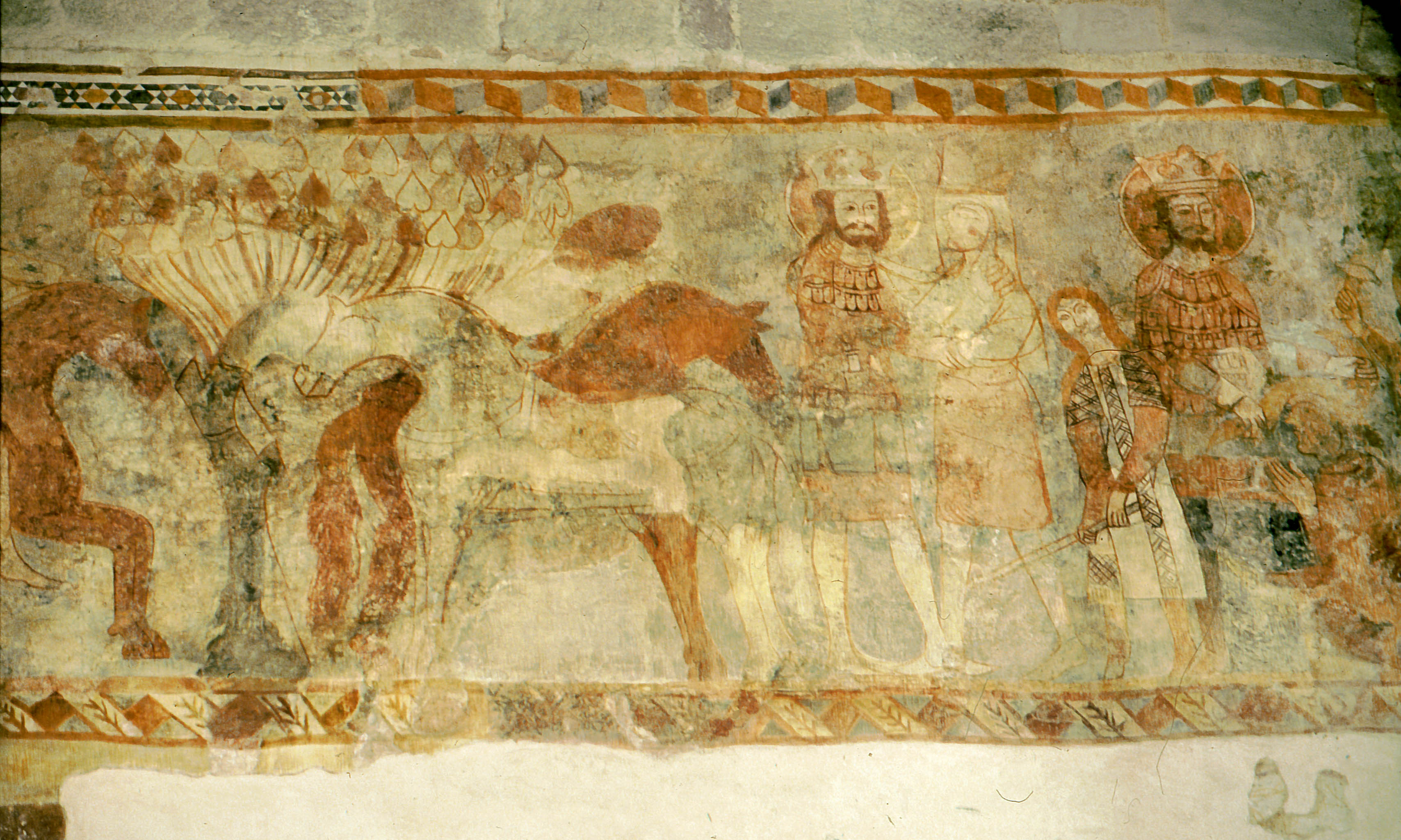 A tereskei római katolikus templom középkori falfreskója – Szent László legendája (Nógrád megye, Magyarország)